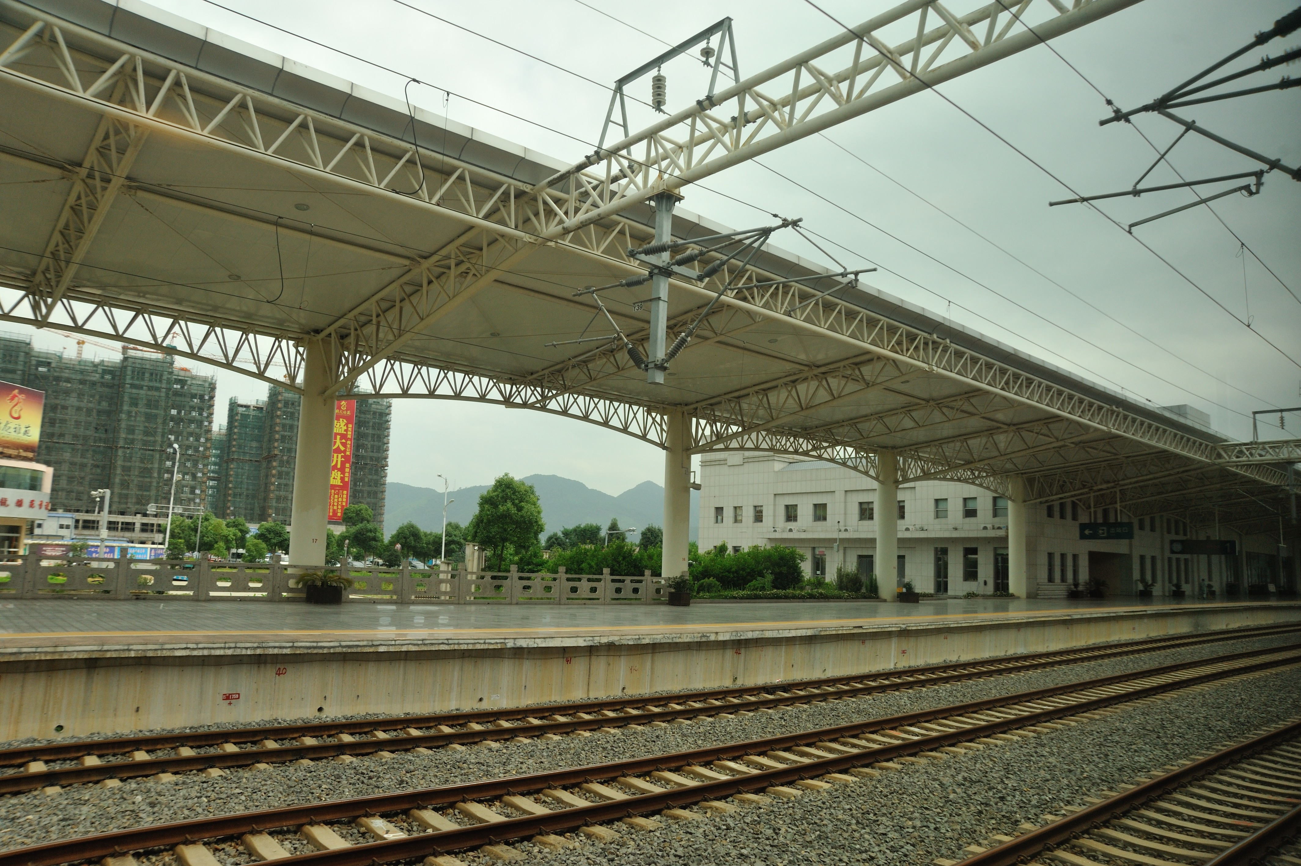 三门县站站台